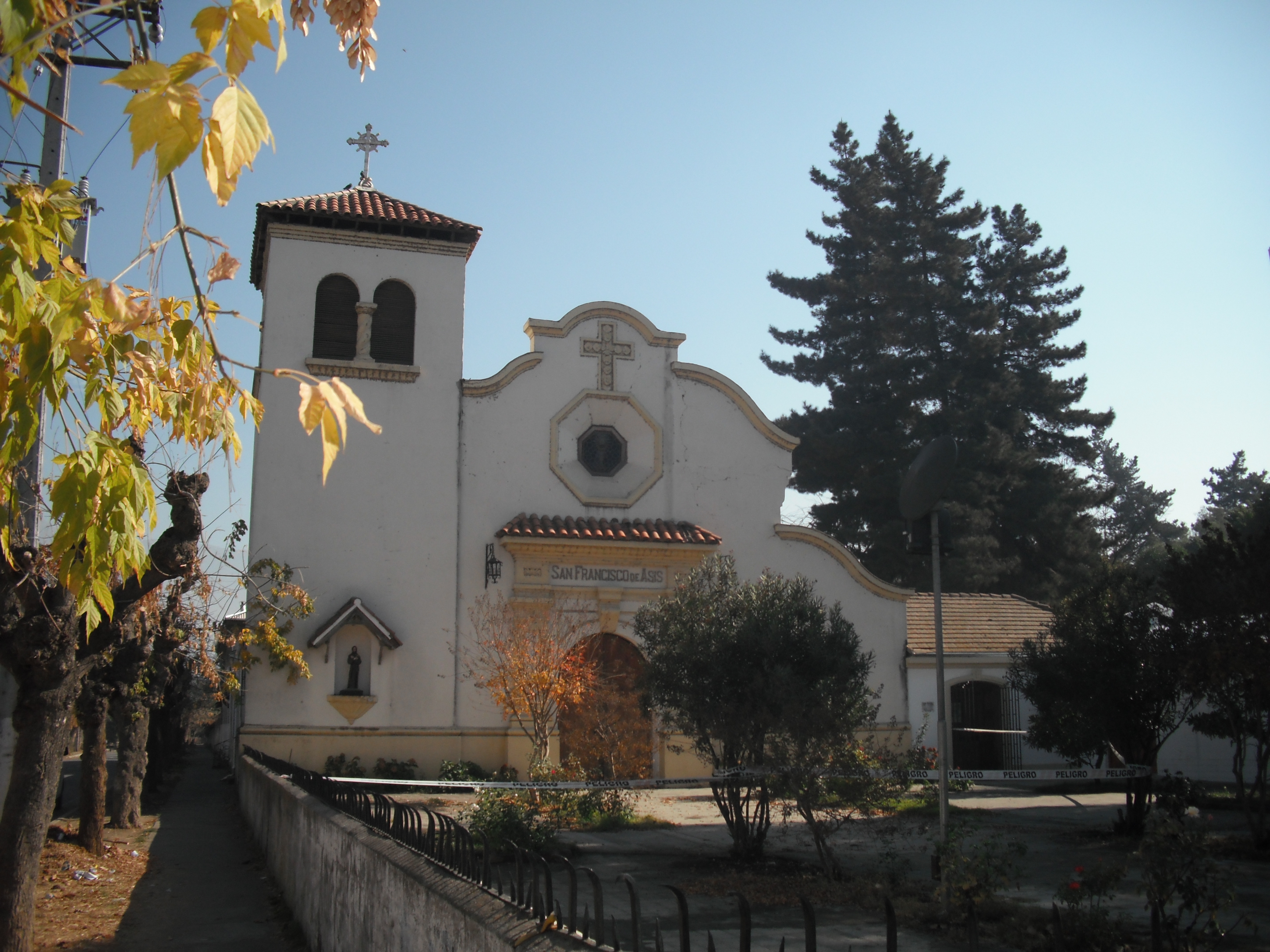 San Francisco de Asis